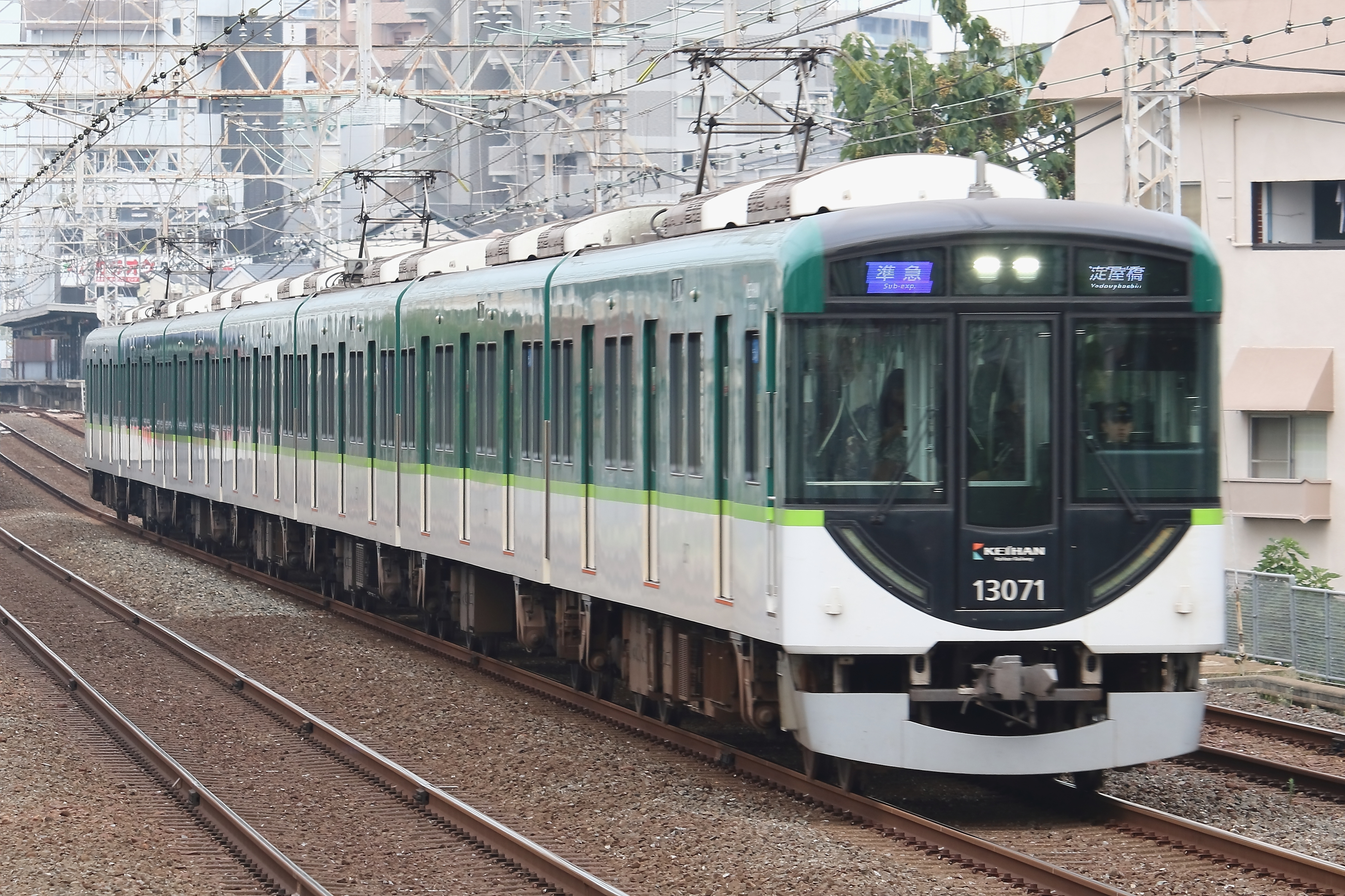 京阪13000系 森小路駅